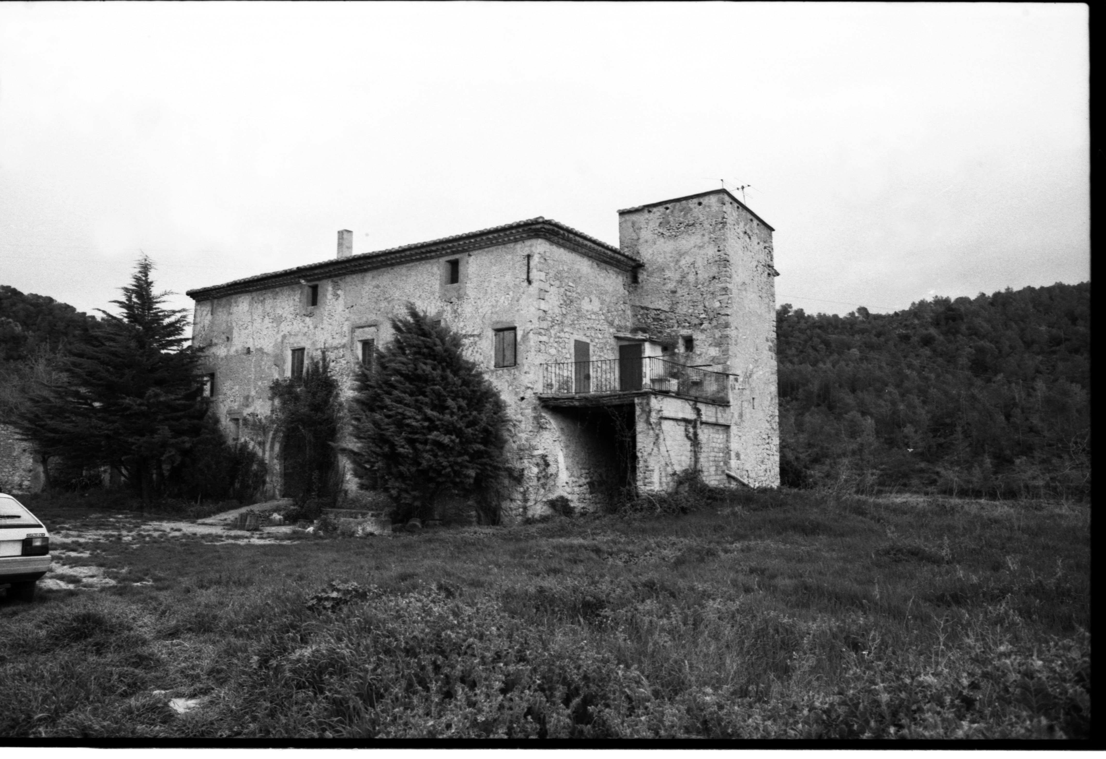 La Masó de Selma (Alt Camp). Actual mas que fou seu d'una comanda rural de l'orde del Temple. Fot. any 1989.